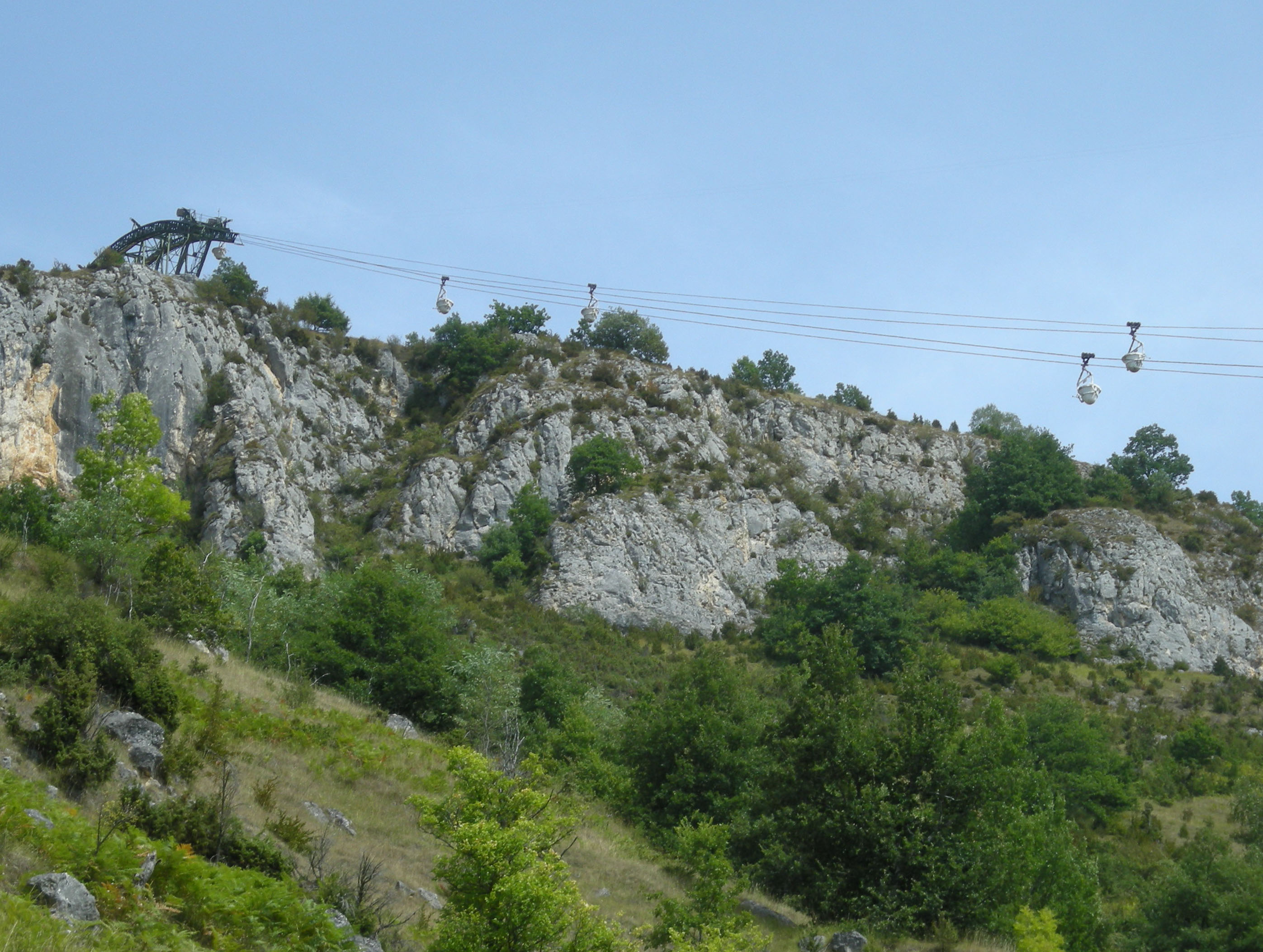 Téléphérique transportant le talc depuis les carrières vers l'usine de Luzenac dans la vallée (Ariège)